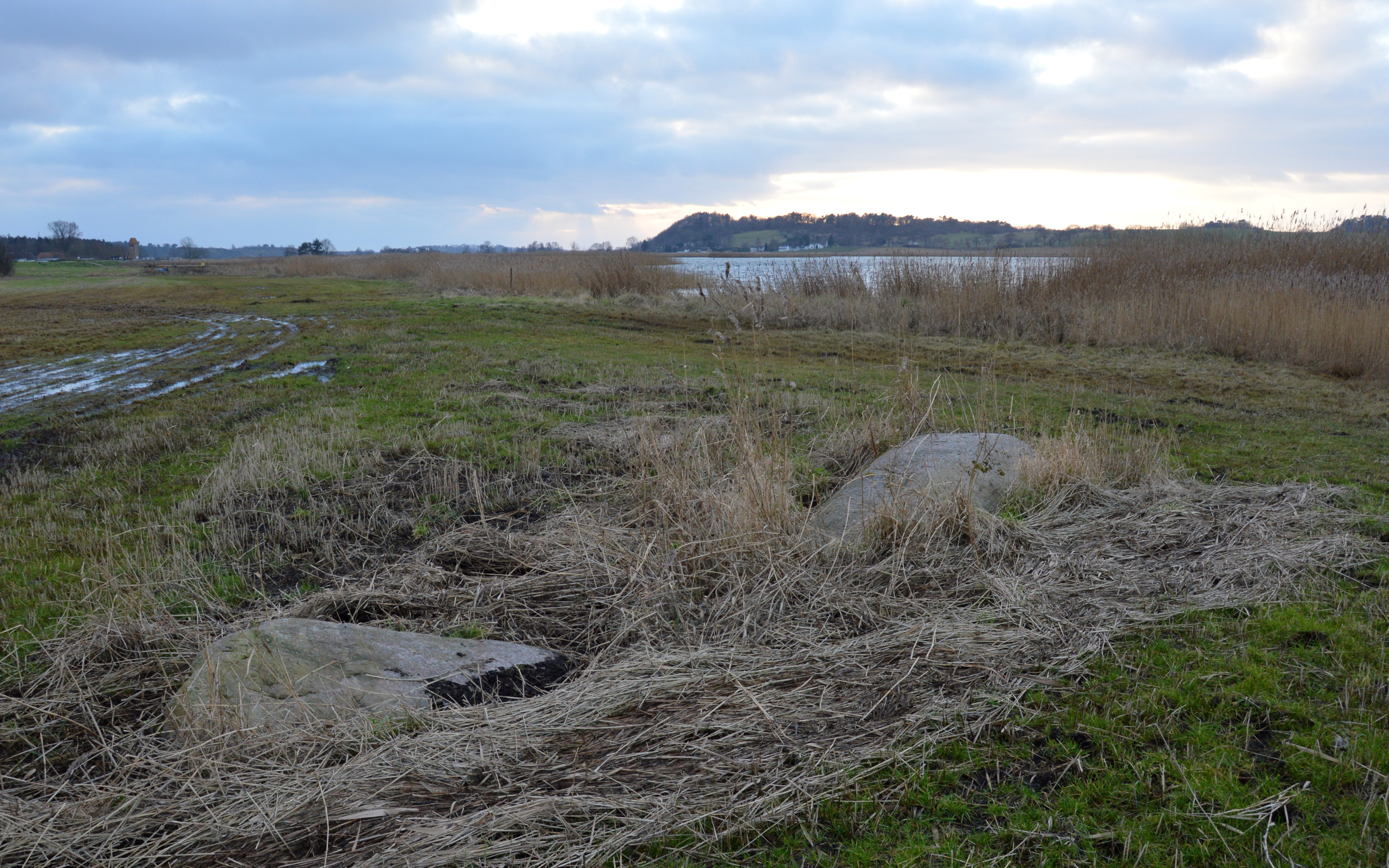 Umfeld des Rittersteins Baabe